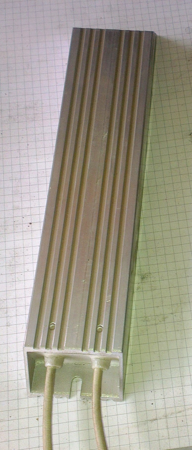 Primer upora za frekvenčni pretvornik.